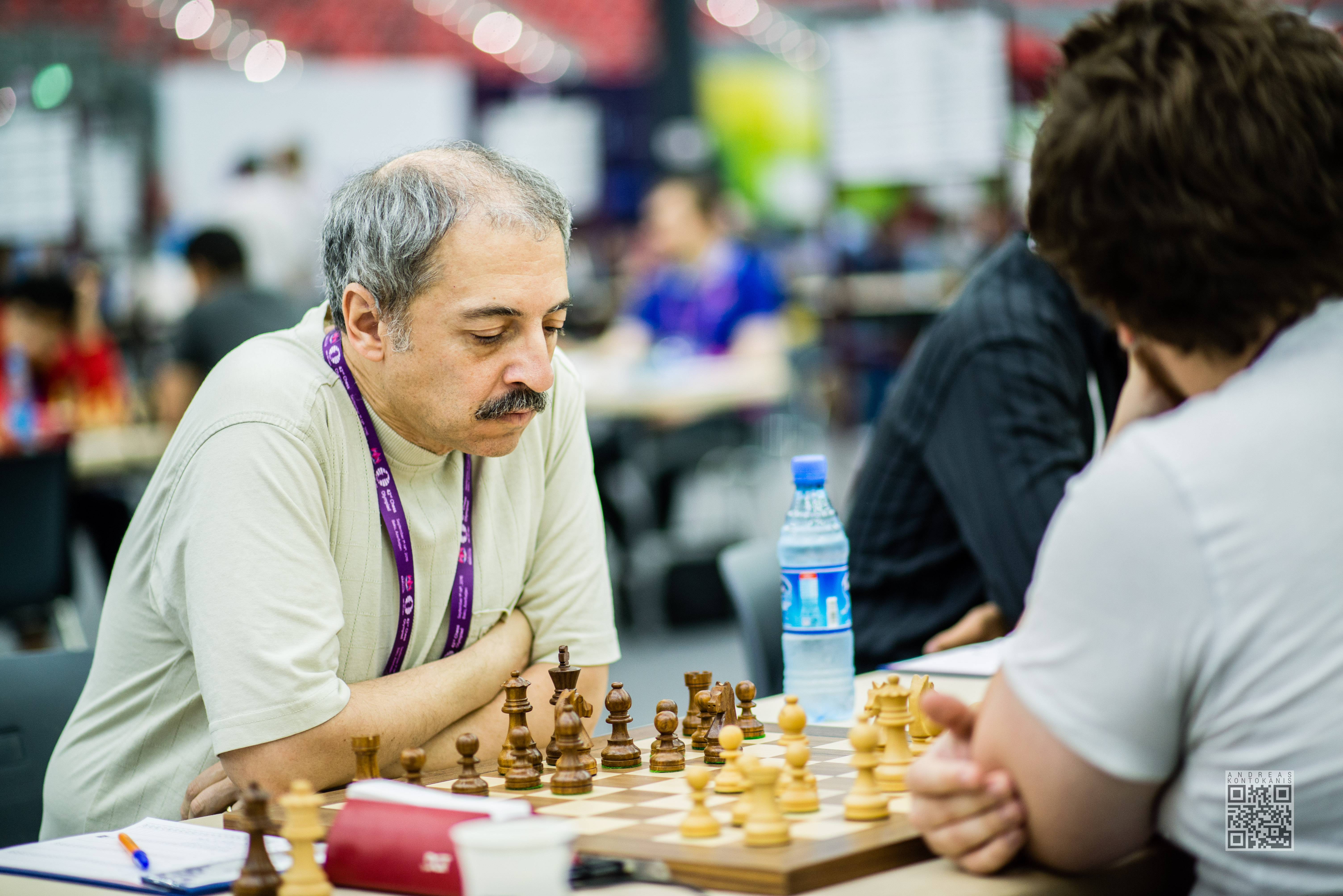 Rozentalis Eduardas